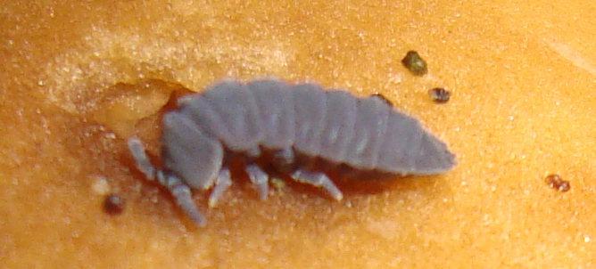 Podkomorské lesy, Česká republika, jižní Morava